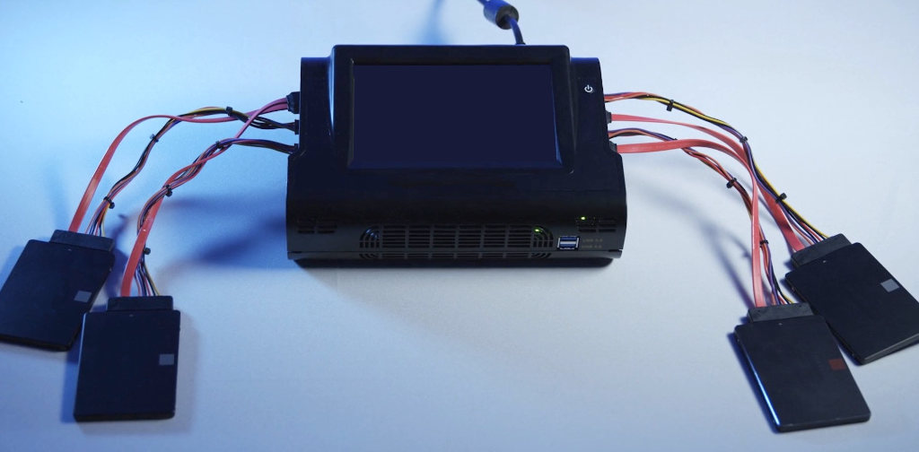 Strumento utilizzato in informatica forense per eseguire copie forensi anche di più dispositivi in contemporanea.